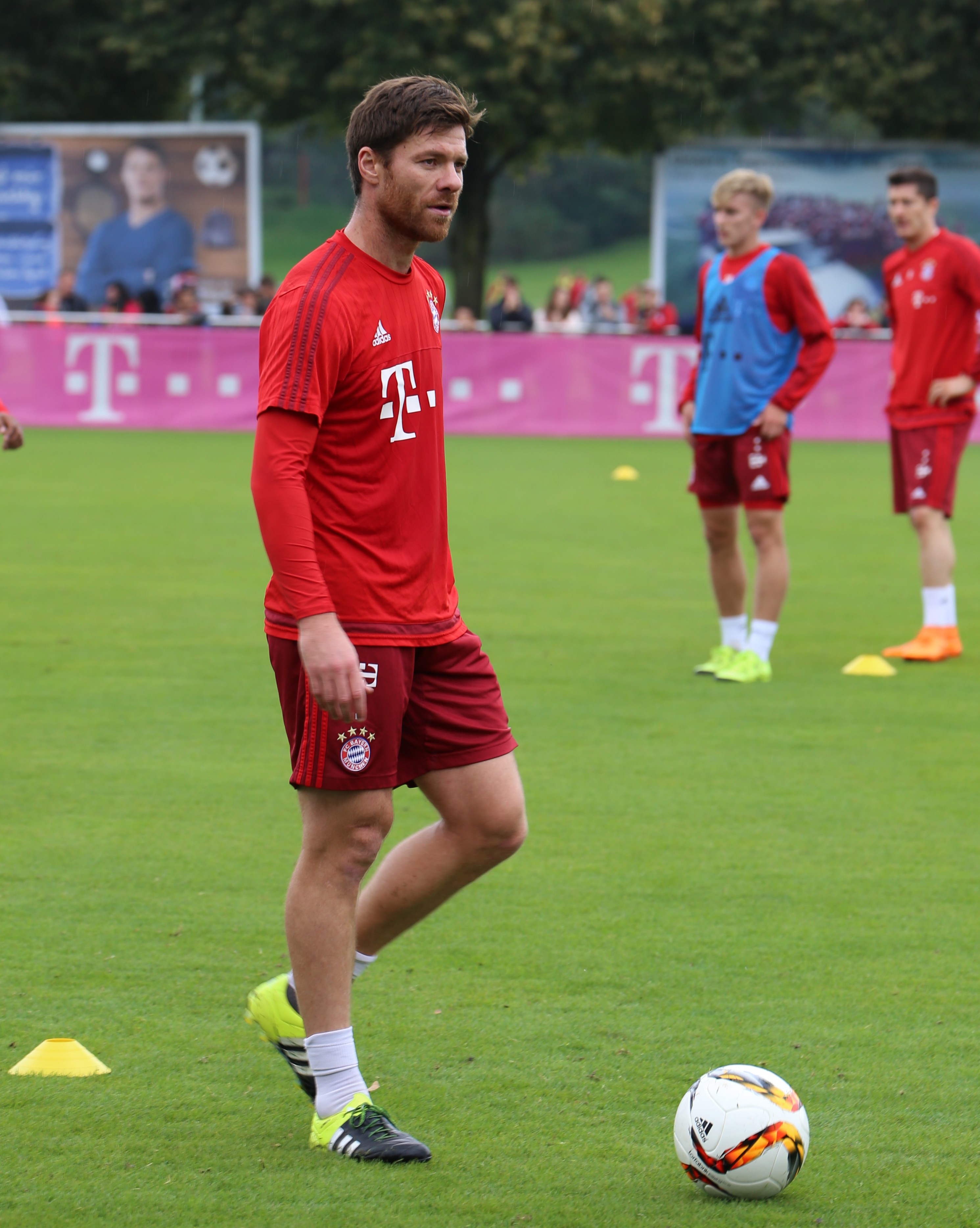 Xabi Alonso beim Training auf dem Gelände des FC Bayern München